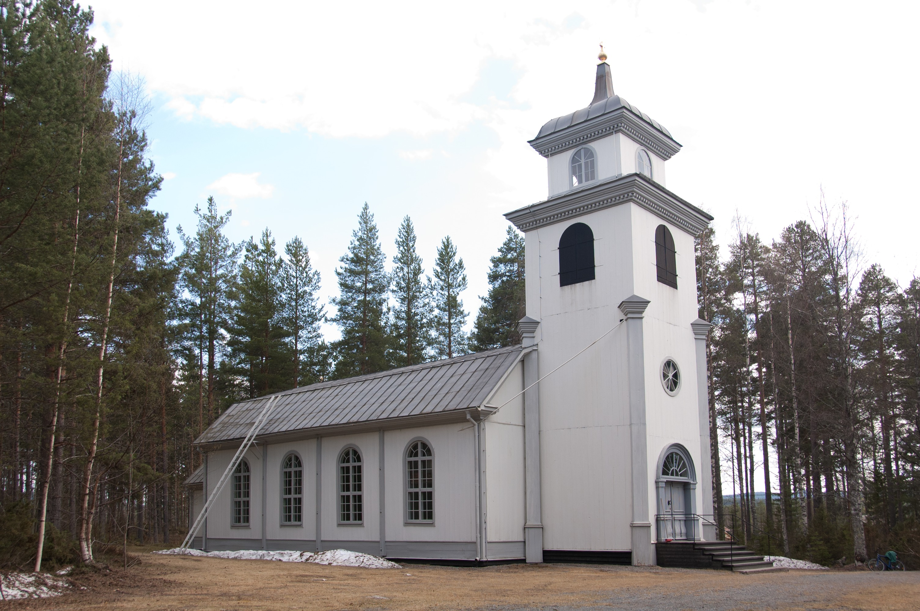 Annefors kapell